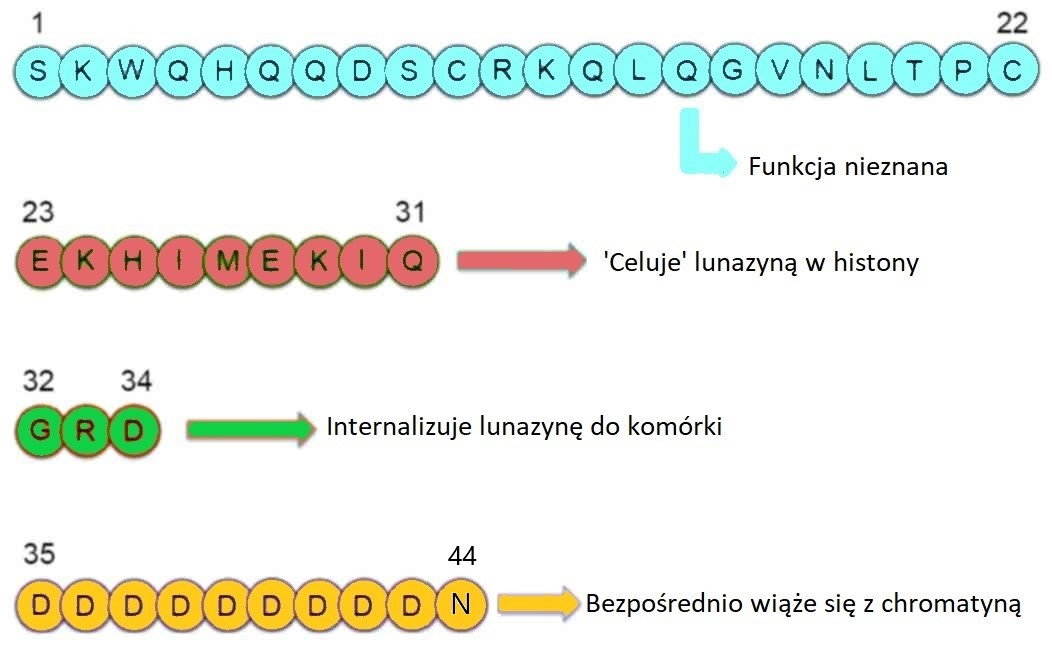 Lunazyna, polipeptyd o masie cząsteczkowej 5,5 kDa, jest w stanie wejść do komórek ssaków i obrać za cel jądra komórkowe w ciągu 18 godzin . Lunazyna zawiera 44 reszty aminokwasów: • fragment o nieznanej funkcji (reszty 1-22), • strukturę helikalną (reszty 23-31), która ‘przyciąga’ lunazynę do histonów H3/H4; • moduł transportu Arg-Gly-Asp (RGD) (reszty 32-34), umożliwiając migrację do komórki oraz pobudza aktywność wewnątrzkomórkową lunazyny; • krytycznego fragmentu dziewięcu kwasów asparaginowych oraz asparginy na C-końcu, który bierze udział w funkcjach przeciwnowotworowych. Pełna sekwencja lunazyny to SKW QH QQD SCR KQL QGV NLT PCE KHI MEK IQG RDD DDD DDD DDN, a fragmenty są przedstawione powyżej.